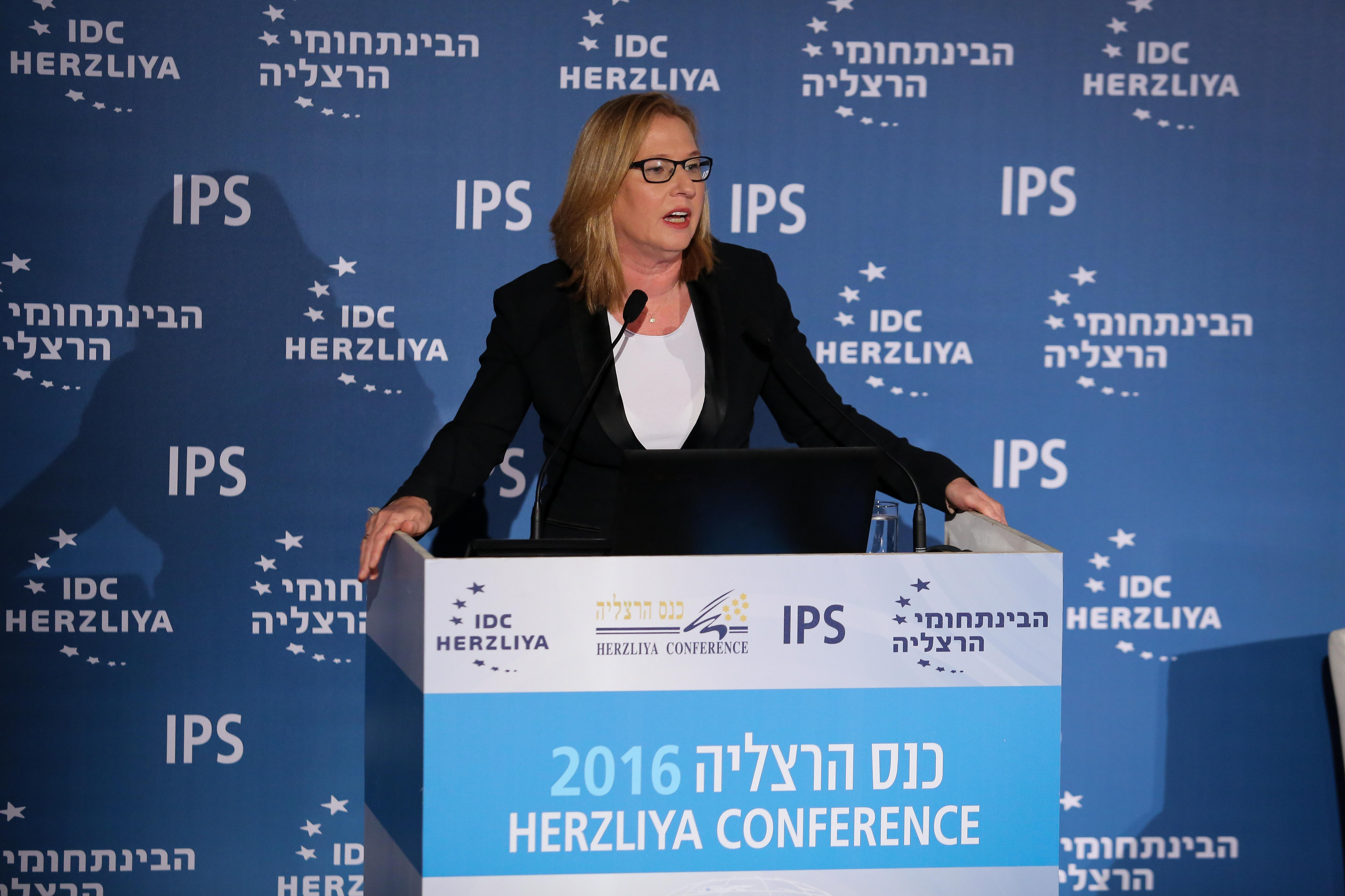 ציפי לבני בכנס הרצליה 2016 של המכון למדיניות ואסטרטגיה במרכז הבינתחומי הרצליה